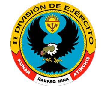 I División del Ejército del Perú